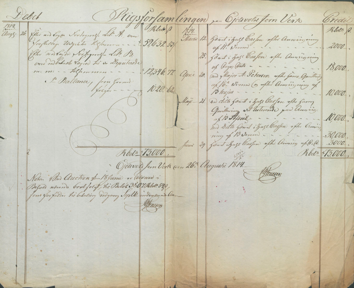 Riksforsamlingens regnskap, Riksarkivet, 5. departement for finans- handels- og tollfaget, RA/S-3893/C/Cb/L0014